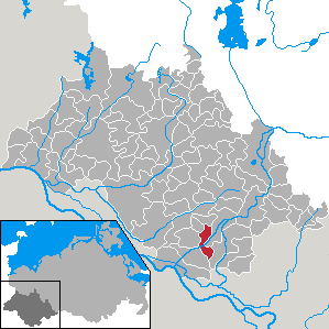 Malk Göhren in Mecklenburg-Vorpommern - district Ludwigslust